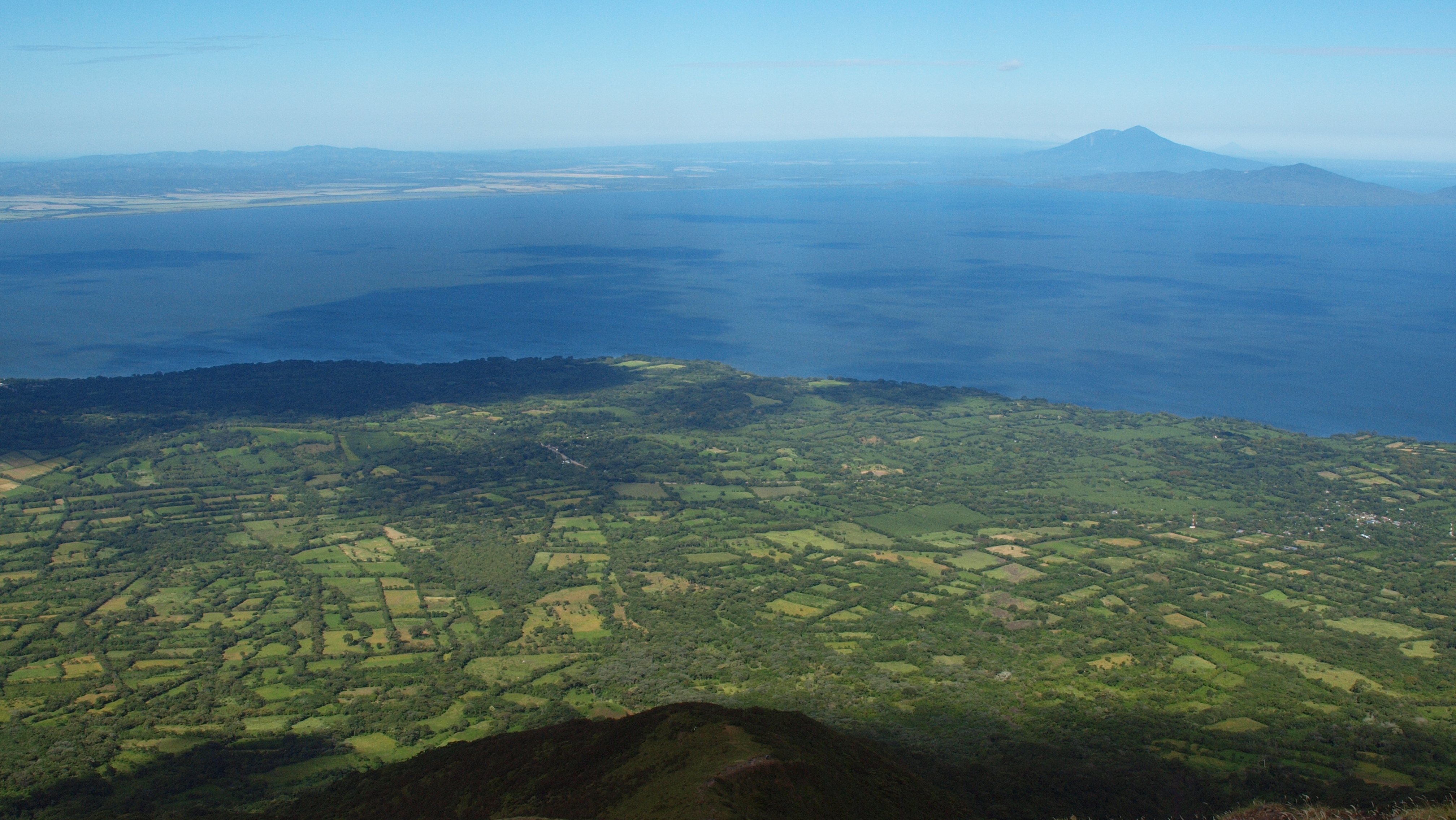 Nicaragua, Ometepe, Blick vom Concepción (Vulkan) Richtung Nord-Westen